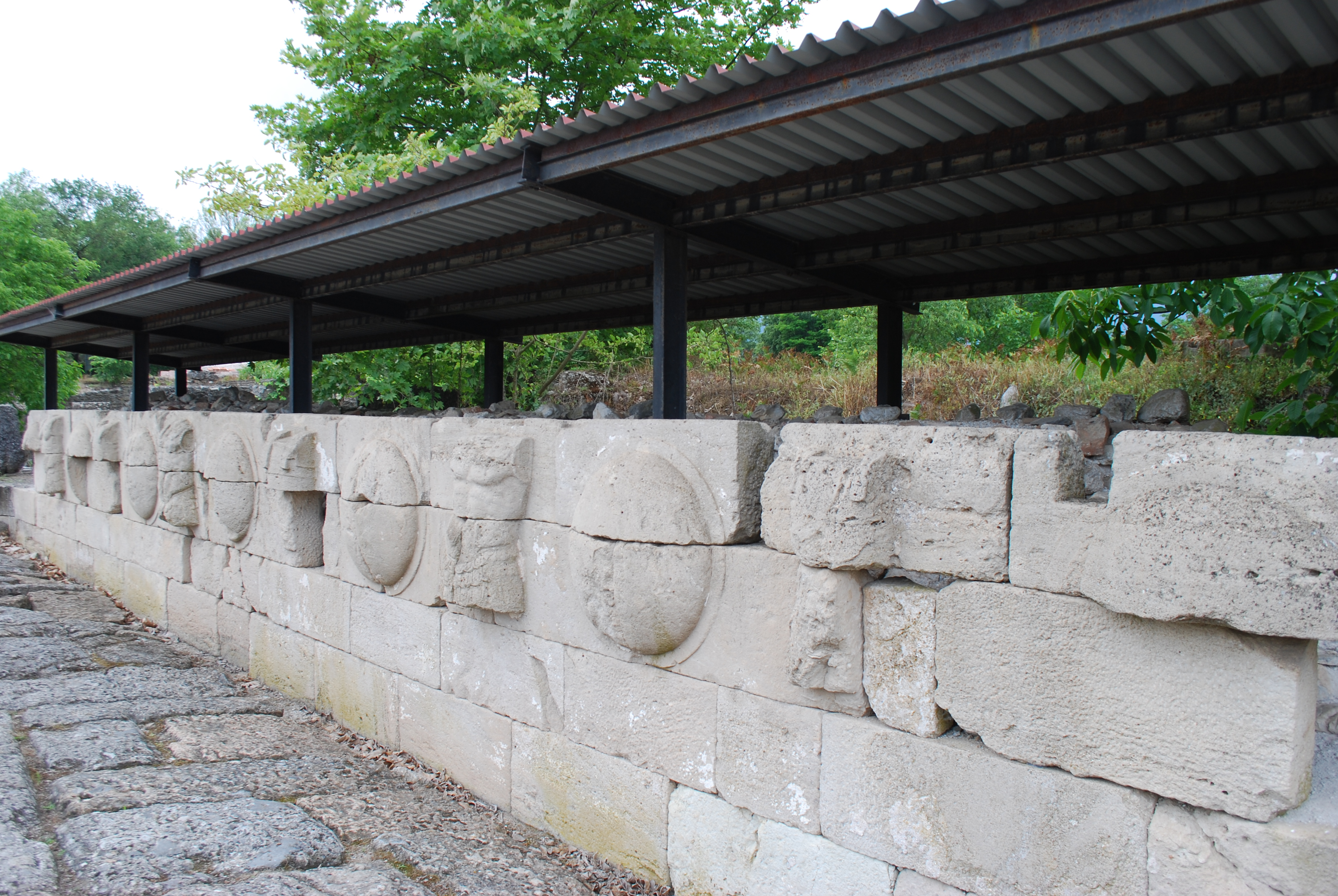 Vue du site archéologique de l'ancienne Dion, au pied du Mont Olympe (Grèce).